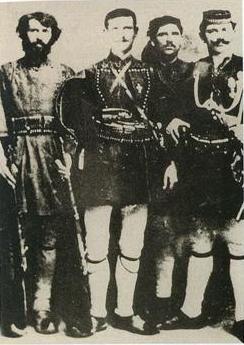 Наум Спанос (втори отляво).